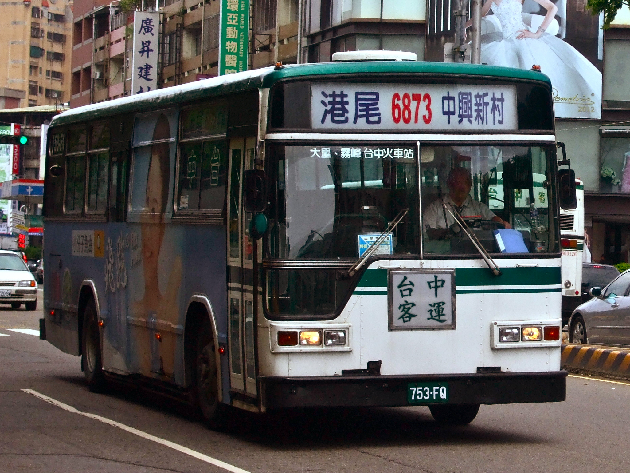 台中客運 753-FQ 營運台中市公車 101 路，行駛於台中市民權路。本車為 HINO ERK2JM 日盈車體，原台北客運車輛。